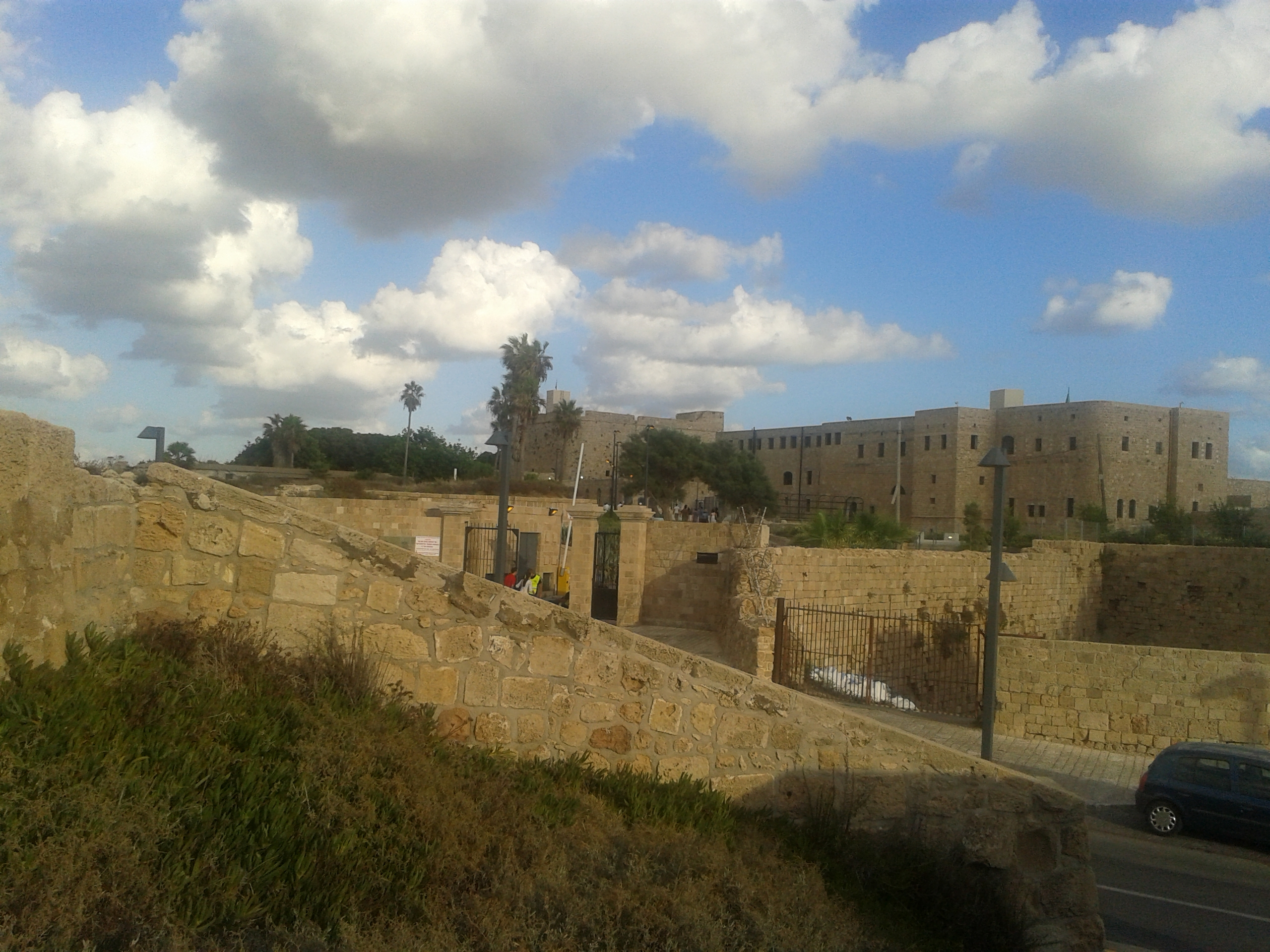 המצודה בעכו נבנתה בימי הטורקים על בסיסה של המצודה ההוספיטלרית בצפונה של העיר העתיקה. המצודה הייתה חלק מן המבנה ההגנתי של עכו, וצידה הצפוני שולב בחומה הצפונית ובמגדל השמירה בורג' אל חזינה. המצודה בנויה סביב שתי חצרות מלבניות, אורכה ממזרח למערב הוא כ-170 מטר ורוחבה כמאה מטרים. במהלך המאה ה-20 שימשה המצודה כבית כלא, ובזמן המנדט הבריטי שימשה גם להוצאה להורג של עולי הגרדום. ב-4 במאי 1947 נערך אחד ממבצעי האצ"ל הנועזים, פריצת כלא עכו, שבמסגרתו פרצו חברי האצ"ל אל המצודה, ושחררו רבים מן הכלואים בה. לאחר קום המדינה שימש המקום כבית חולים פסיכיאטרי.